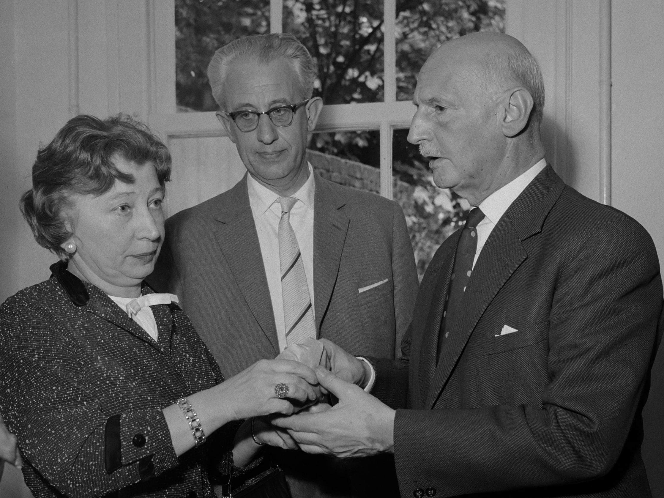 Anne Frank Huis geopend. Miep en haar echtgenoot, Jan en Otto Frank, Anne's vader